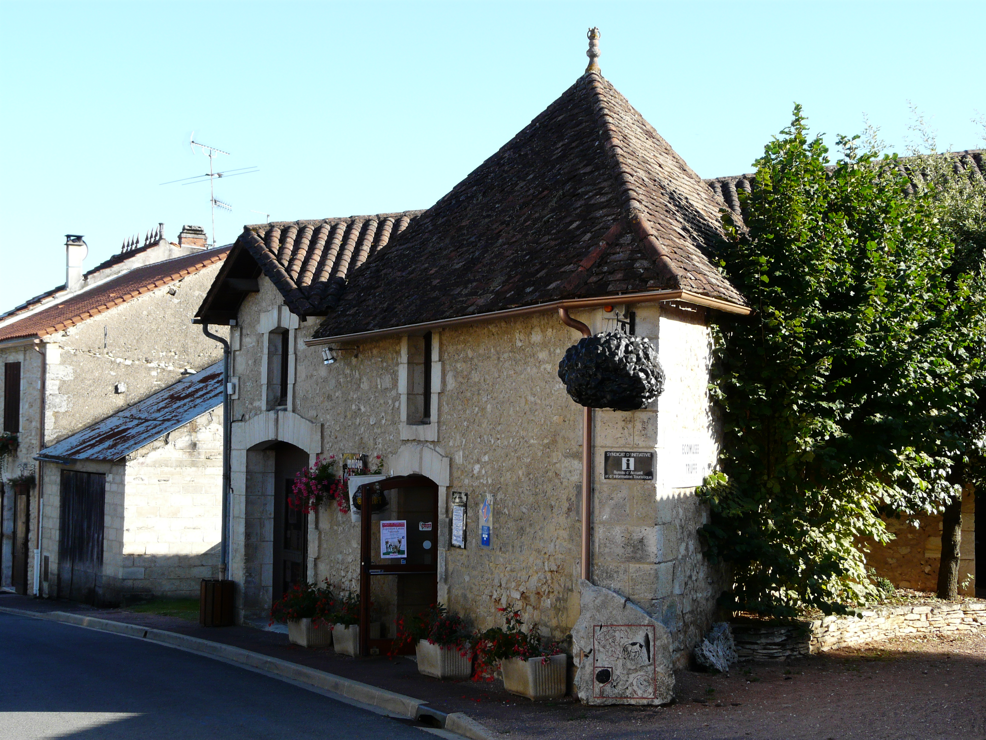 L'écomusée de la truffe, Sorges, Dordogne, France